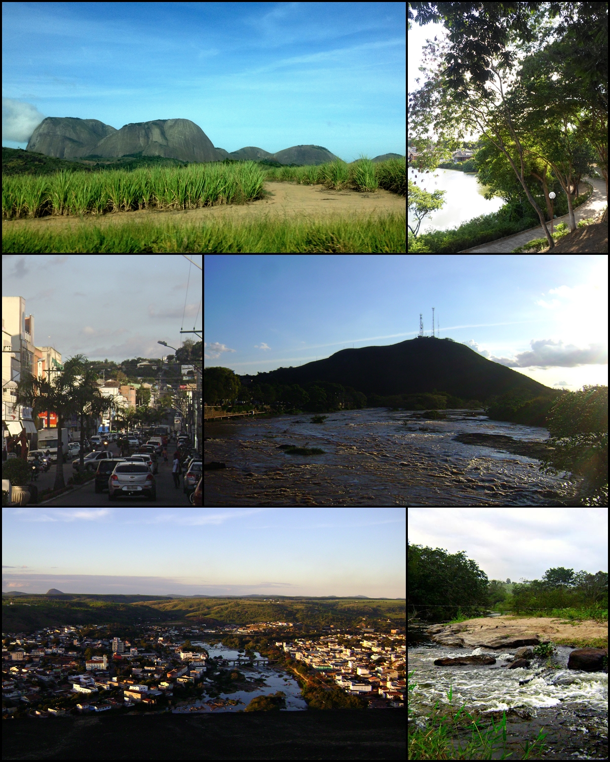 A Cidade de Nanuque: Serra dos Aimorés, Lagoa dos Namorados, Centro, Rio Mucuri, Pedra do Bueno, Ribeirão das Pedras